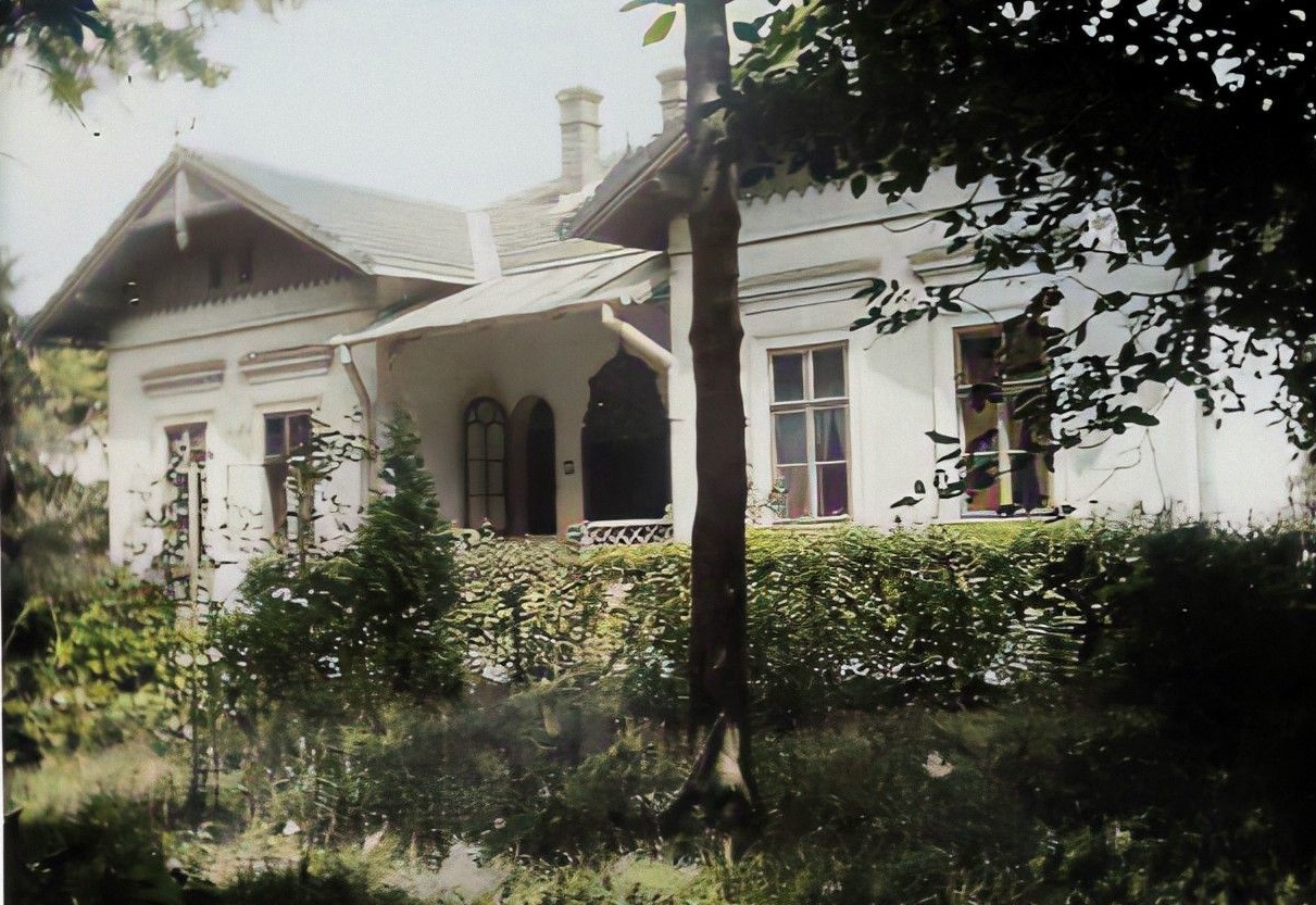 Dworek w Koszycach Małych koło Tarnowa. Fotografia sprzed 1936 r.